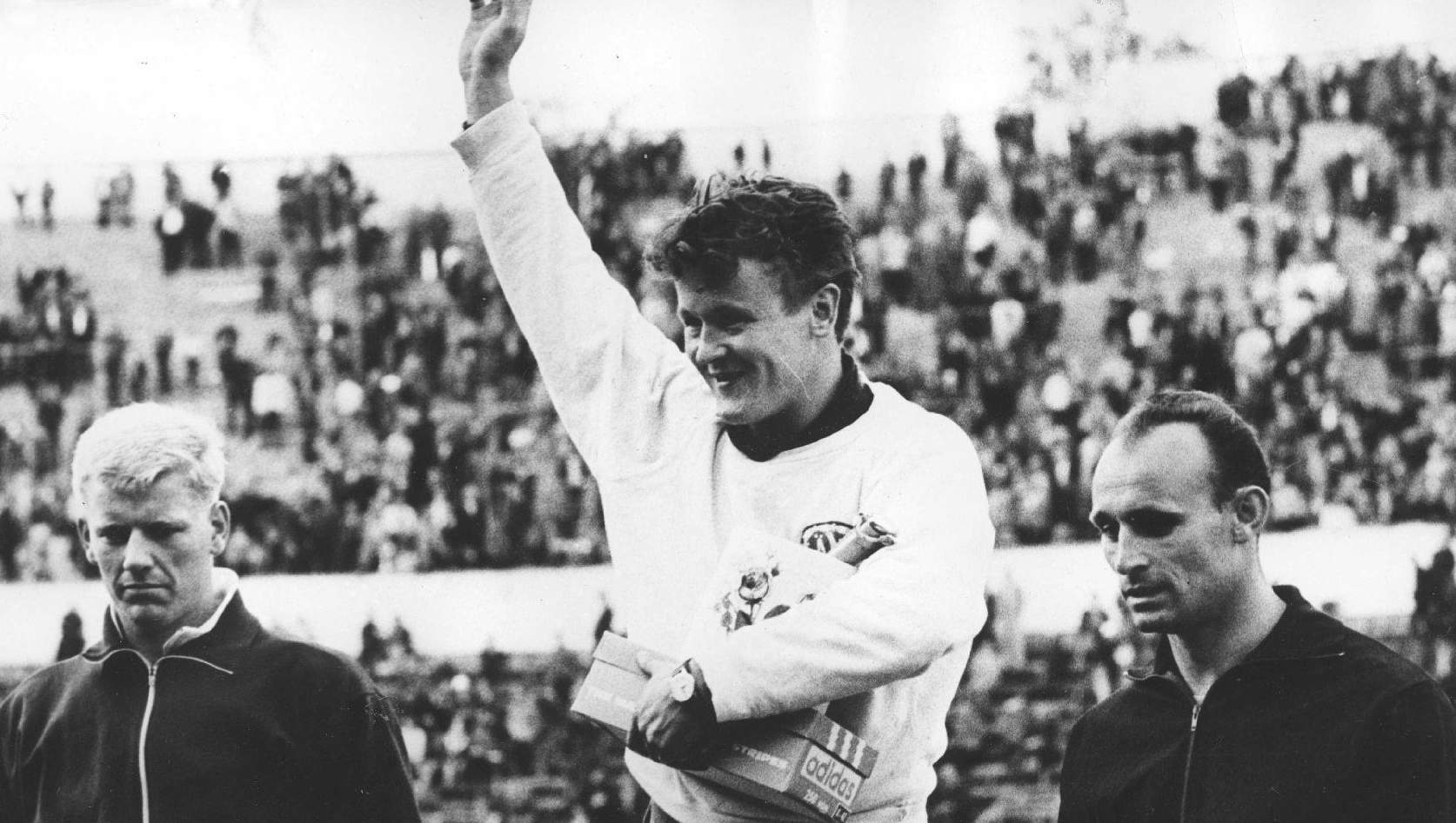 Keihäänheiton palkintojenjako 4. maailmankisoissa Helsingissä 30.6.1965. Vasemmalta Terje Pedersen (Norja), Jorma Kinnunen (Suomi), Gergely Kulcsar (Unkari).